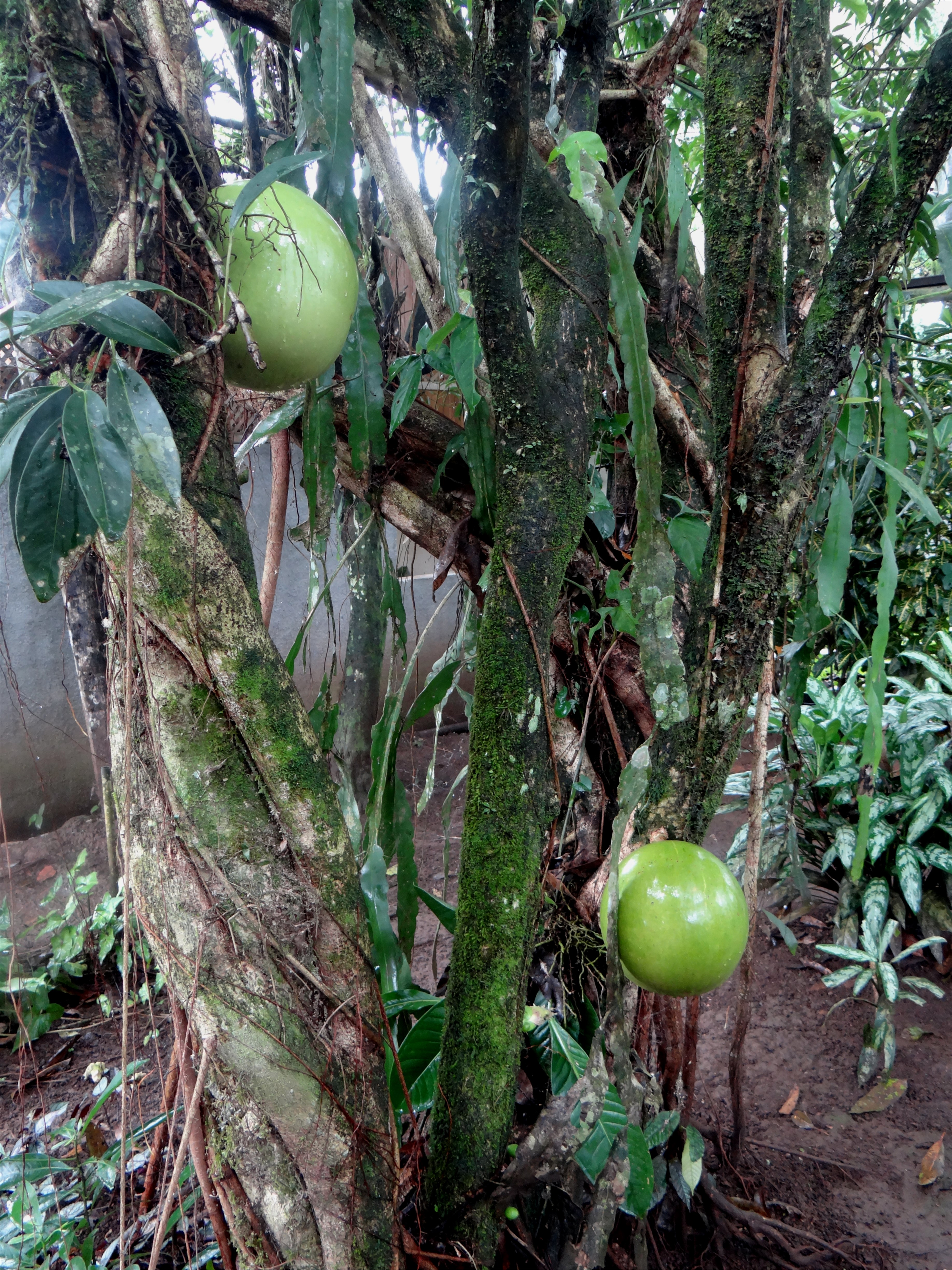 Calebassier, Palenque Tonjibe (village), région de Guatuso, Costa Rica.